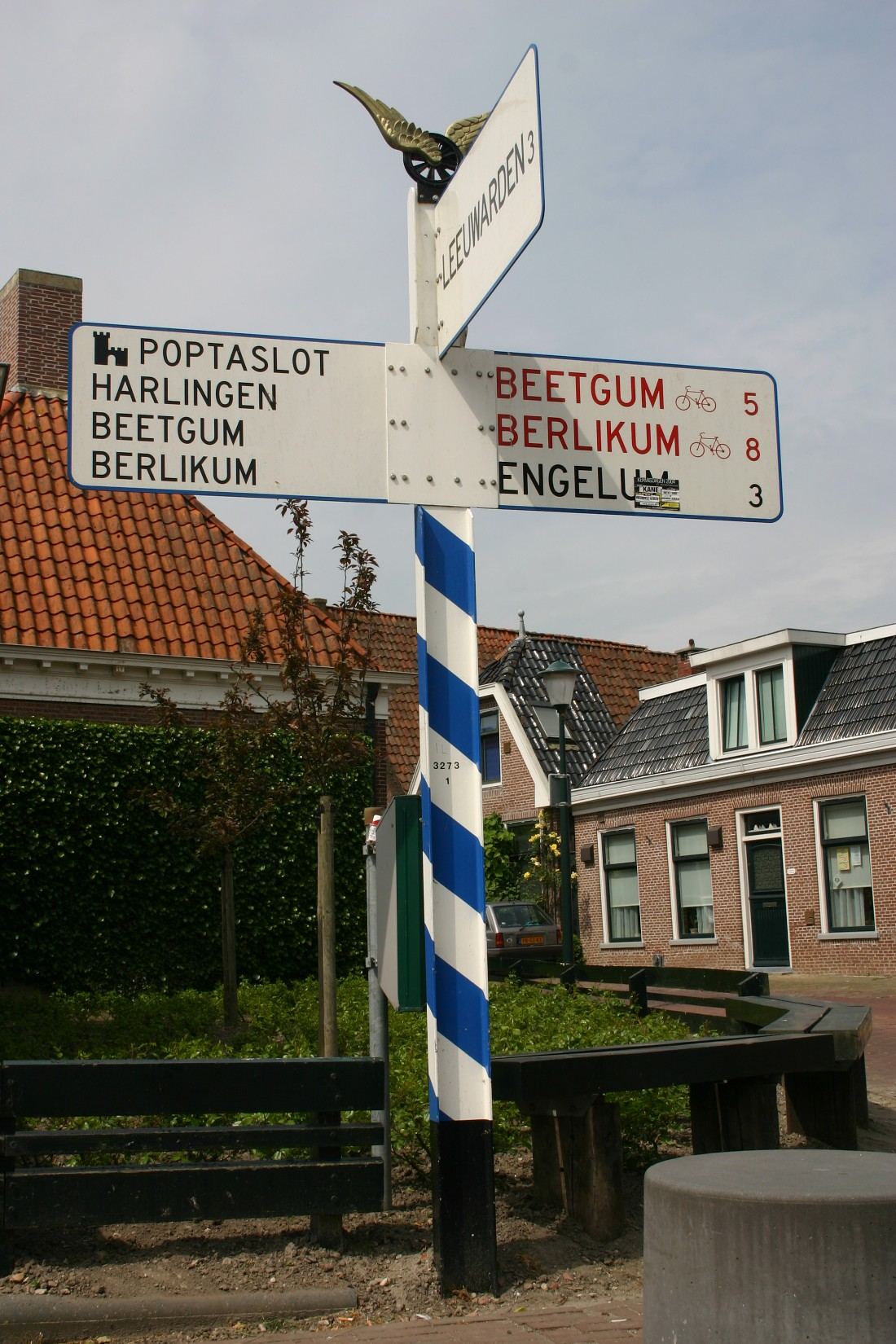 Eigen foto te Friesland van anwb bord